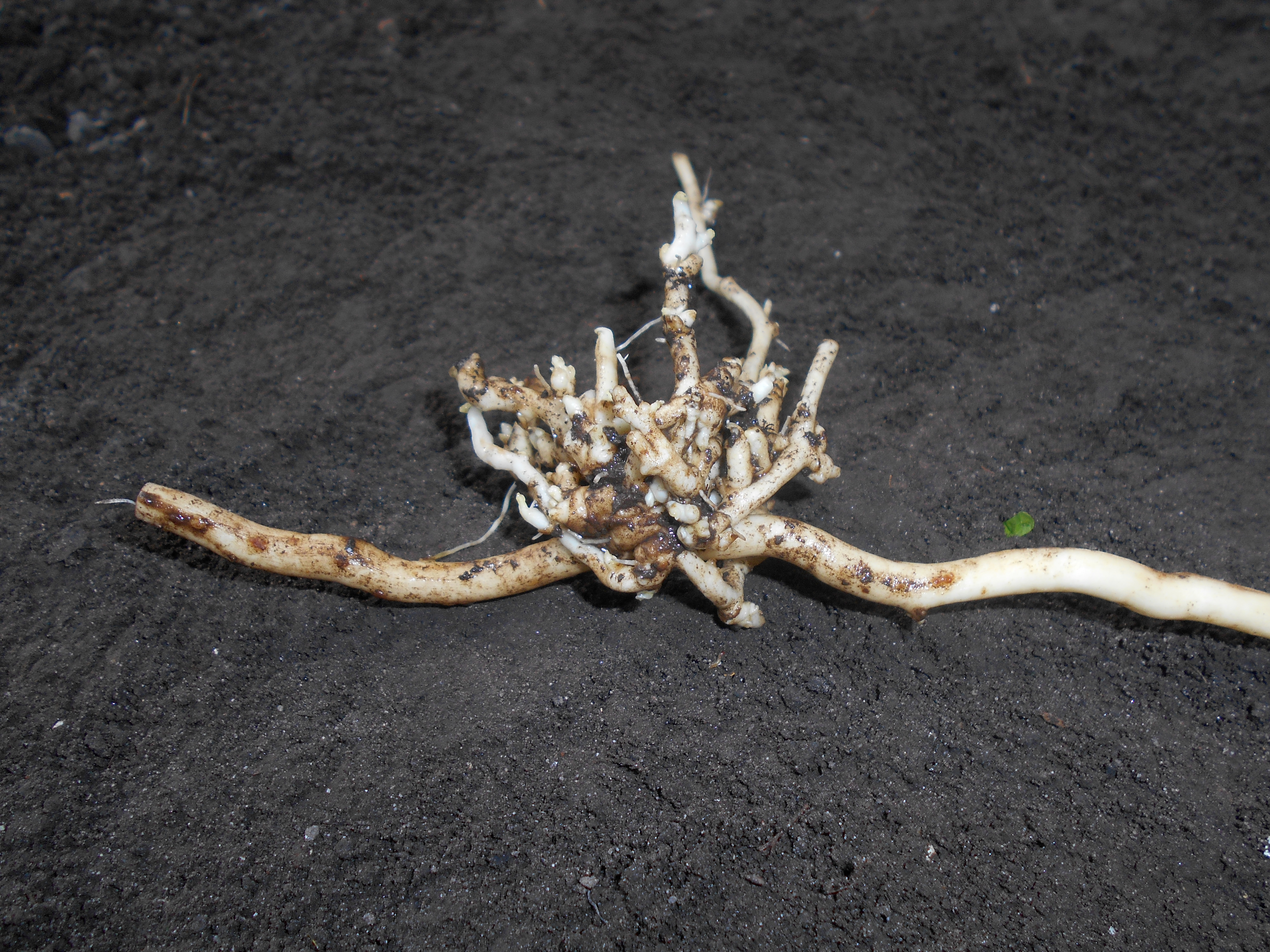 Kielisznik zaroślowy (Calystegia sepium).